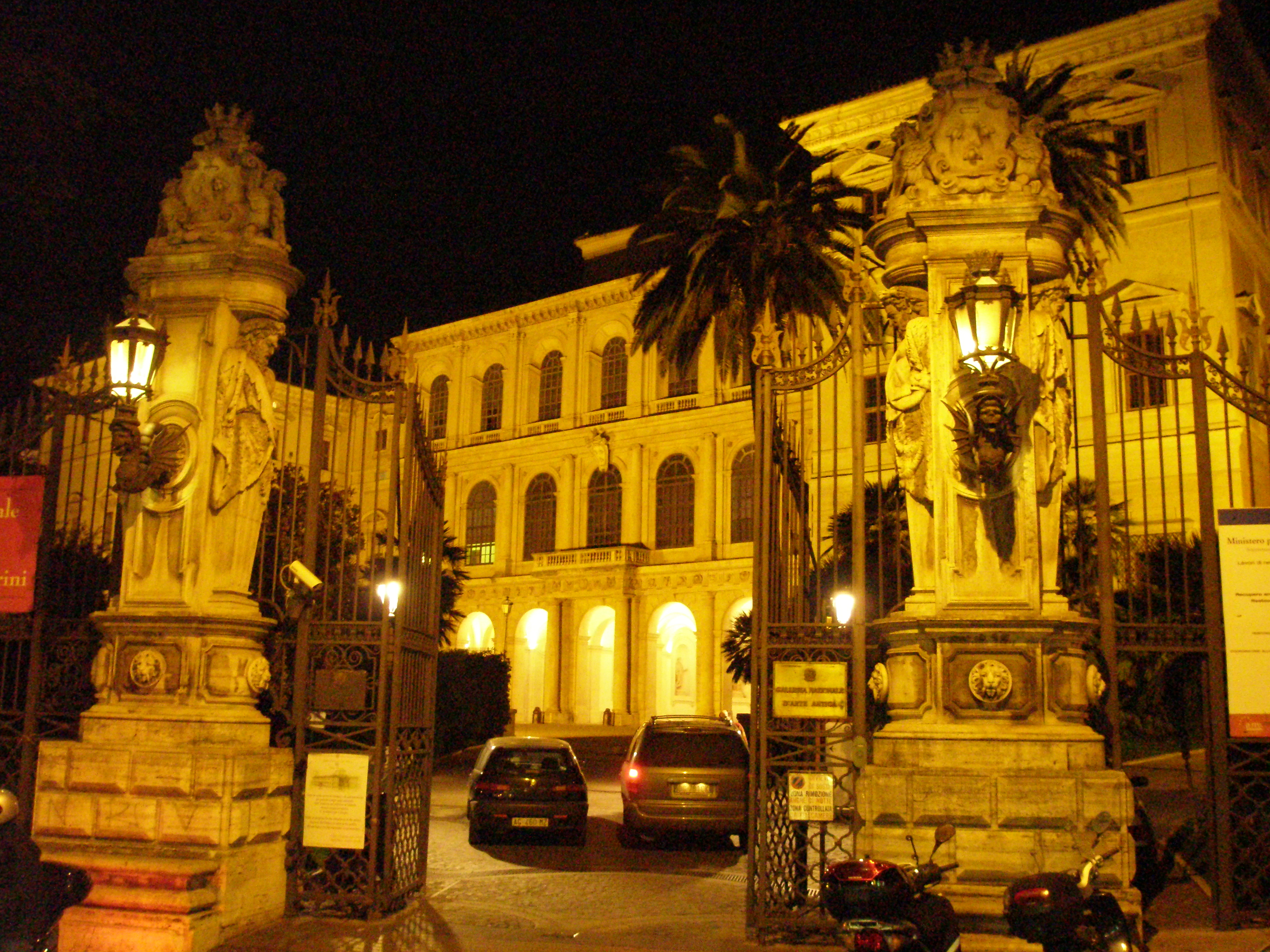 Palazzo Barberini a Roma, di Carlo Maderno, Gian Lorenzo Bernini e Francesco Borromini, Roma, dal 1625.